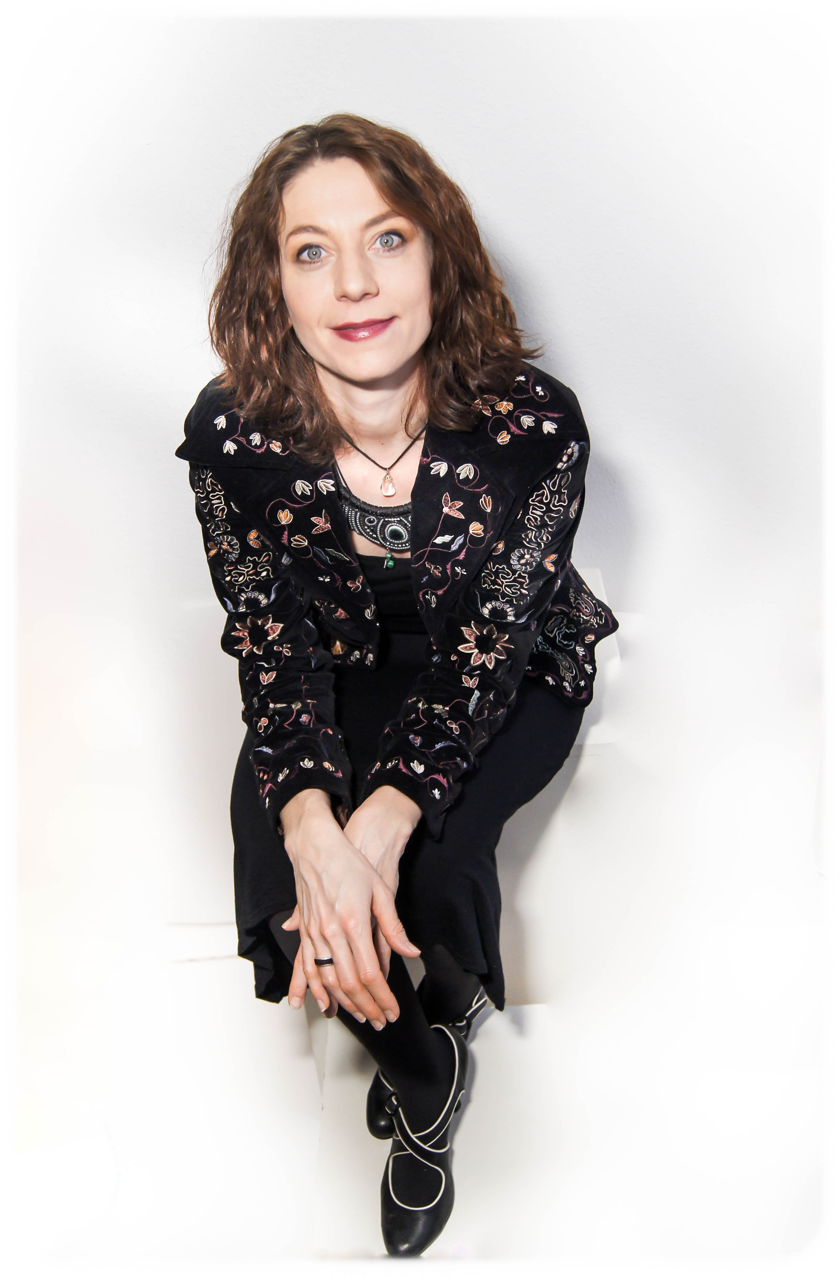 Takáts Eszter portré